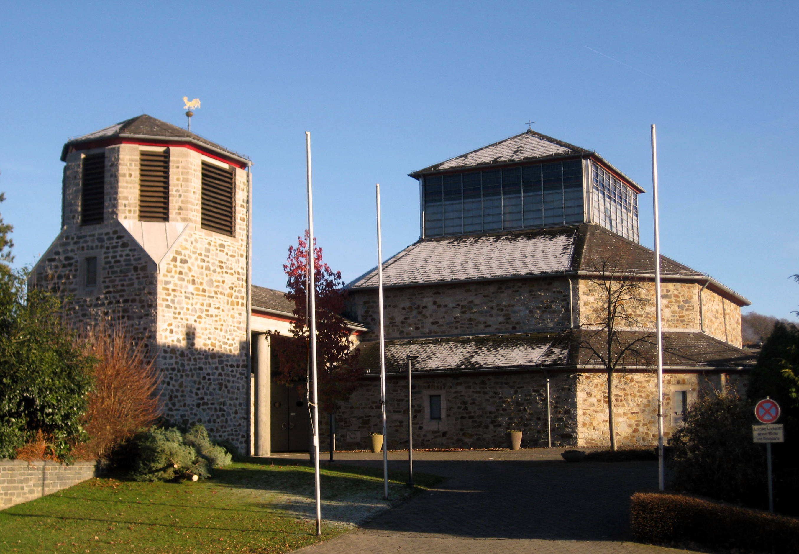 Katholische Kirche im Erzbistum Paderborn, Entwurf 1975, Einweihung 1981